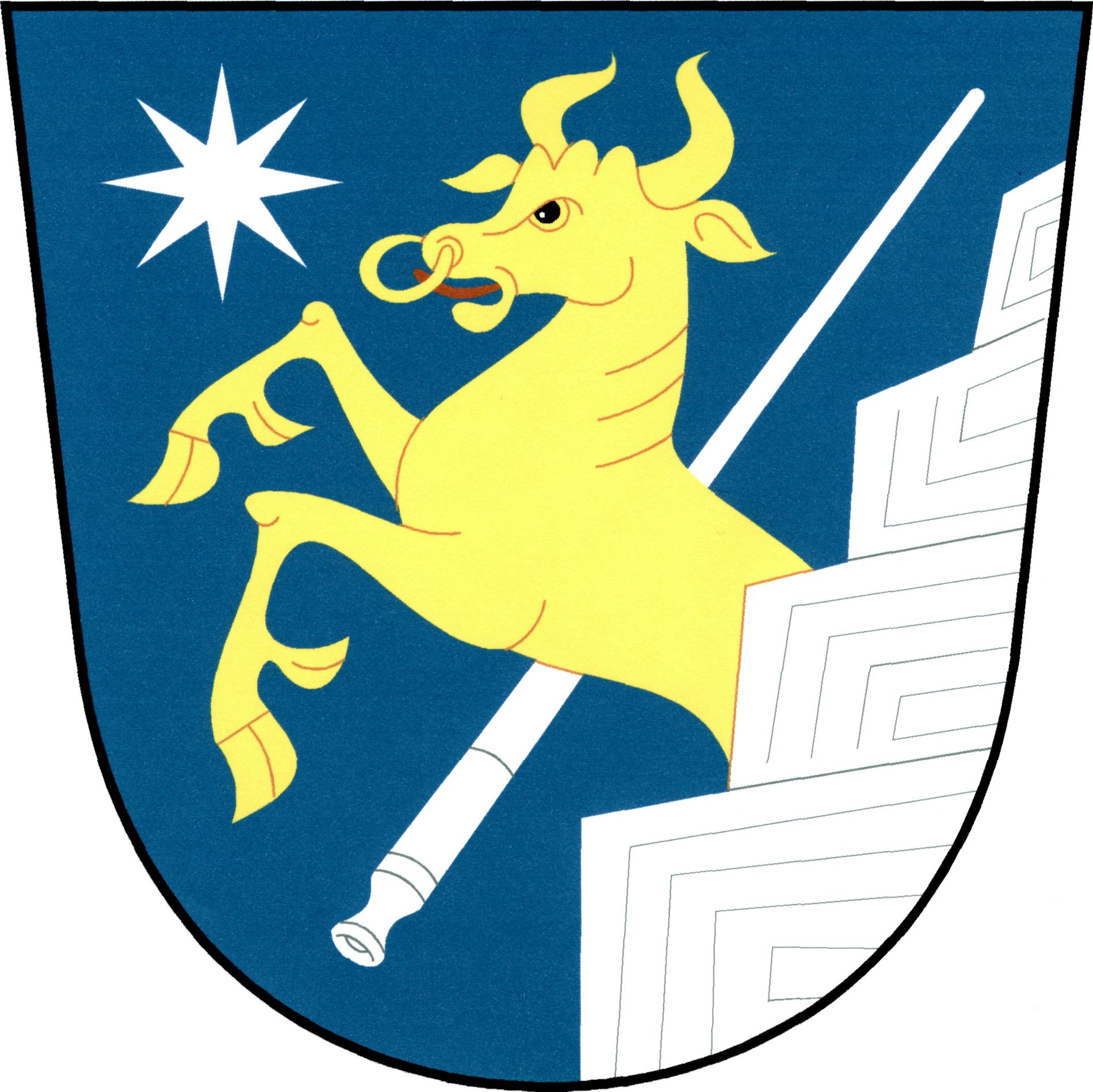 Znak obce Horní Bradlo